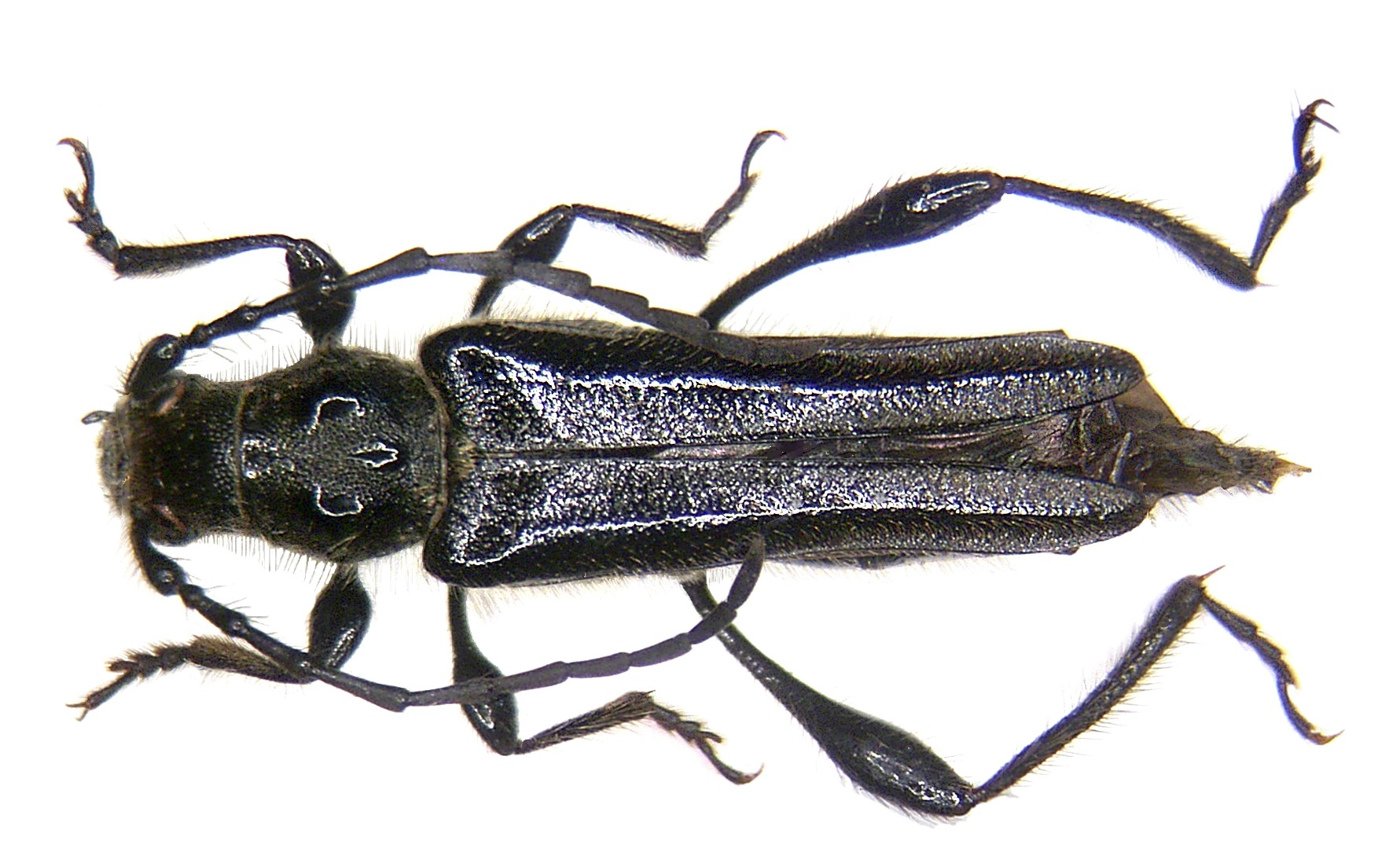 Familie: Cerambycidae Grösse: 6-14 mm Verbreitung: Südeuropa, Nordafrika Ökologie: Entwicklung in Laubholz, Imagines auf Blüten Fundort: Korsika, Ghisonaccia leg.det. U.Schmidt, 1973 Foto: U.Schmidt, 2006